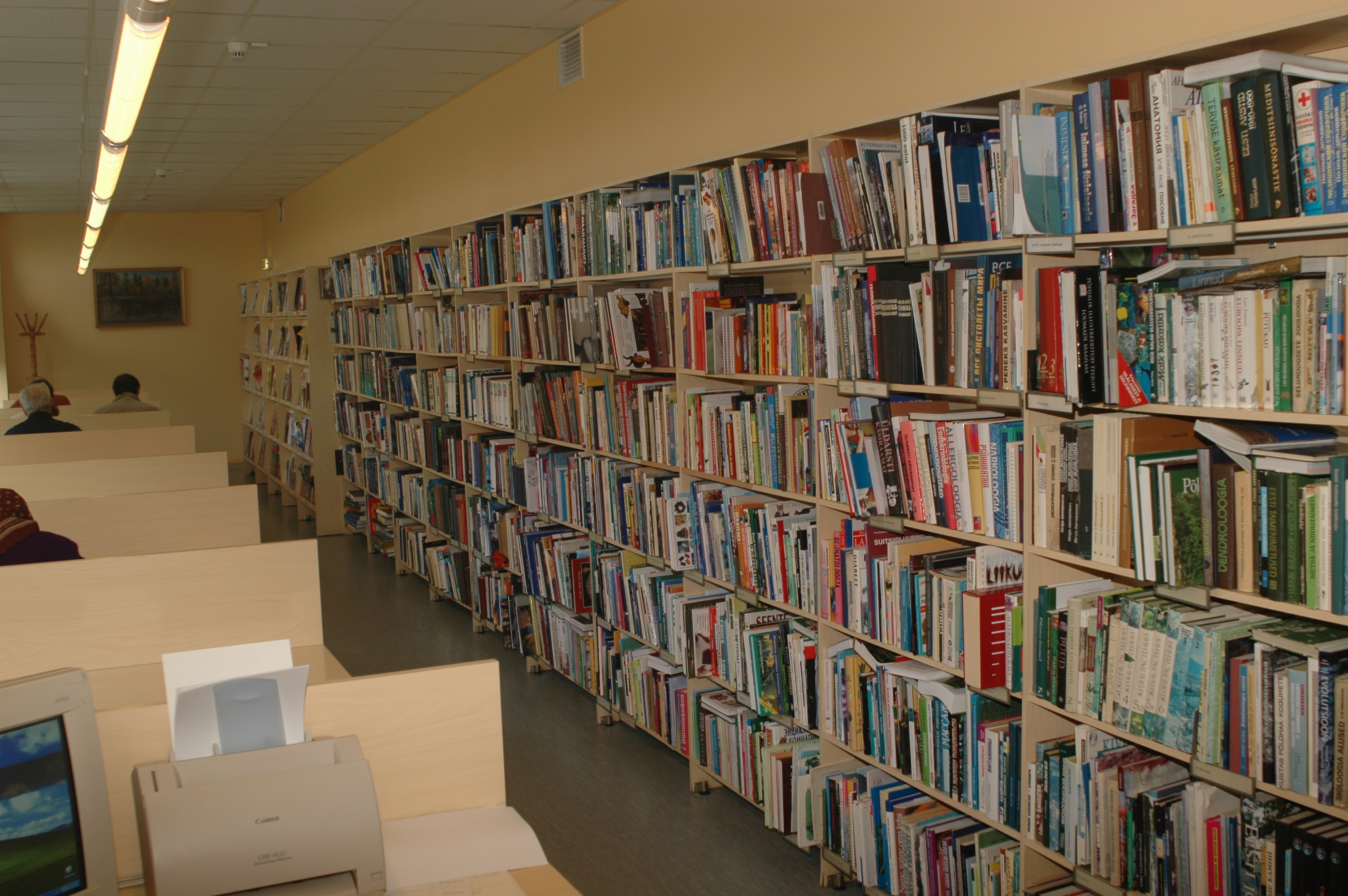 Lugemissaal